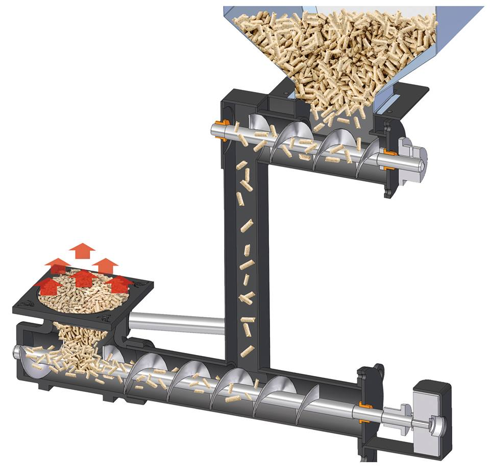 Werking bodemvoeder Dielle